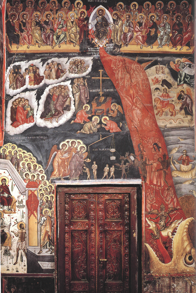 Монастир Святого Варлаама